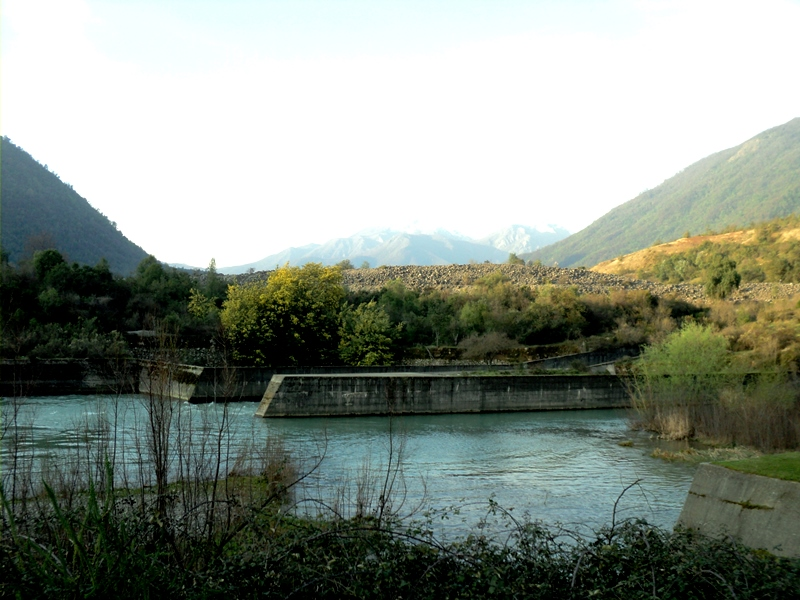 Río Ancoa a la altura de la localidad de Embalse Ancoa, donde iba a construirse originalmente el reservorio. El embalse finalmente fue construido varios kilómetros más arriba.